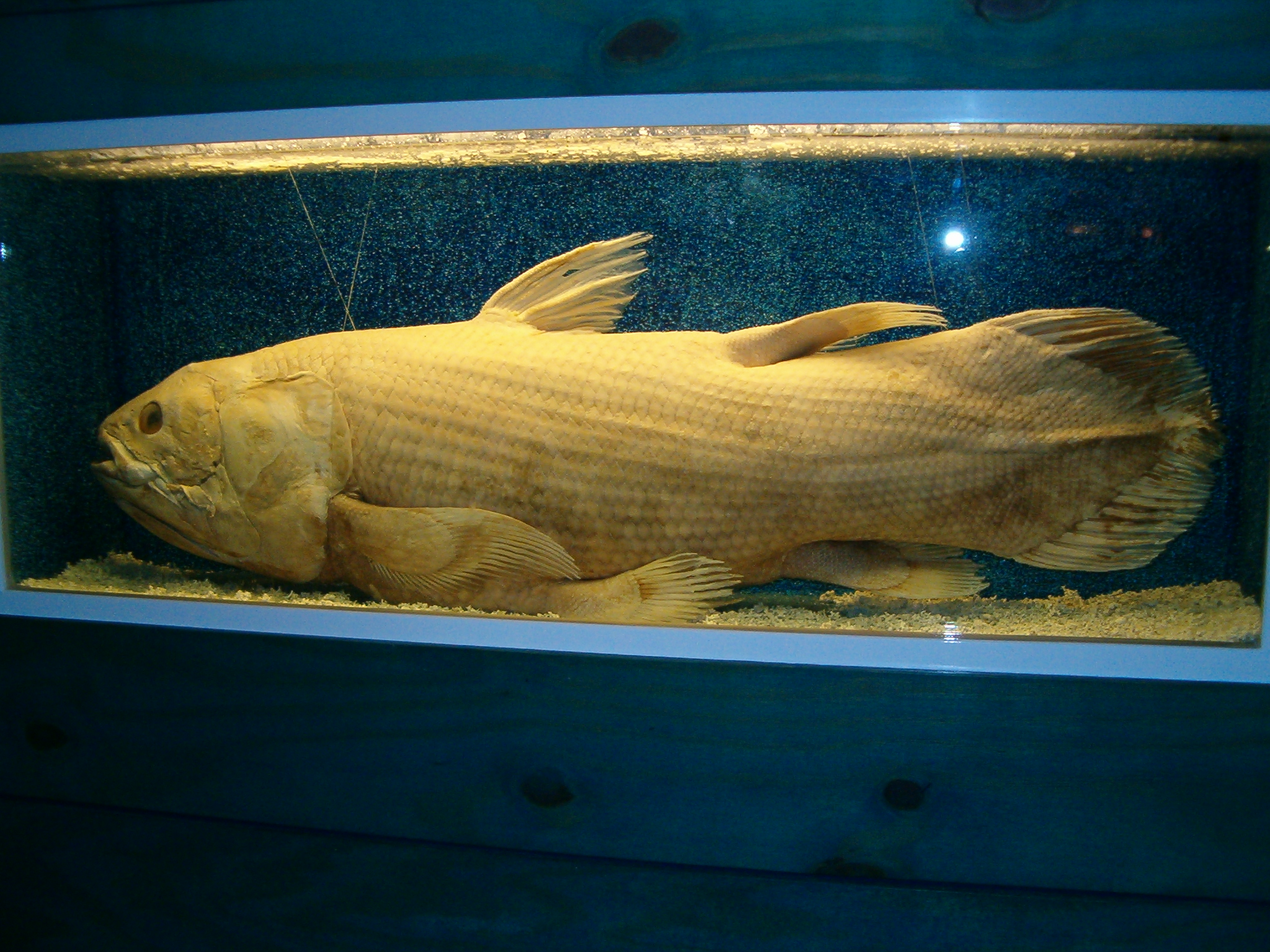 Coelancant